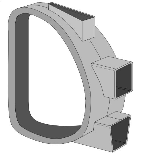 ITER Vacuum Vessel